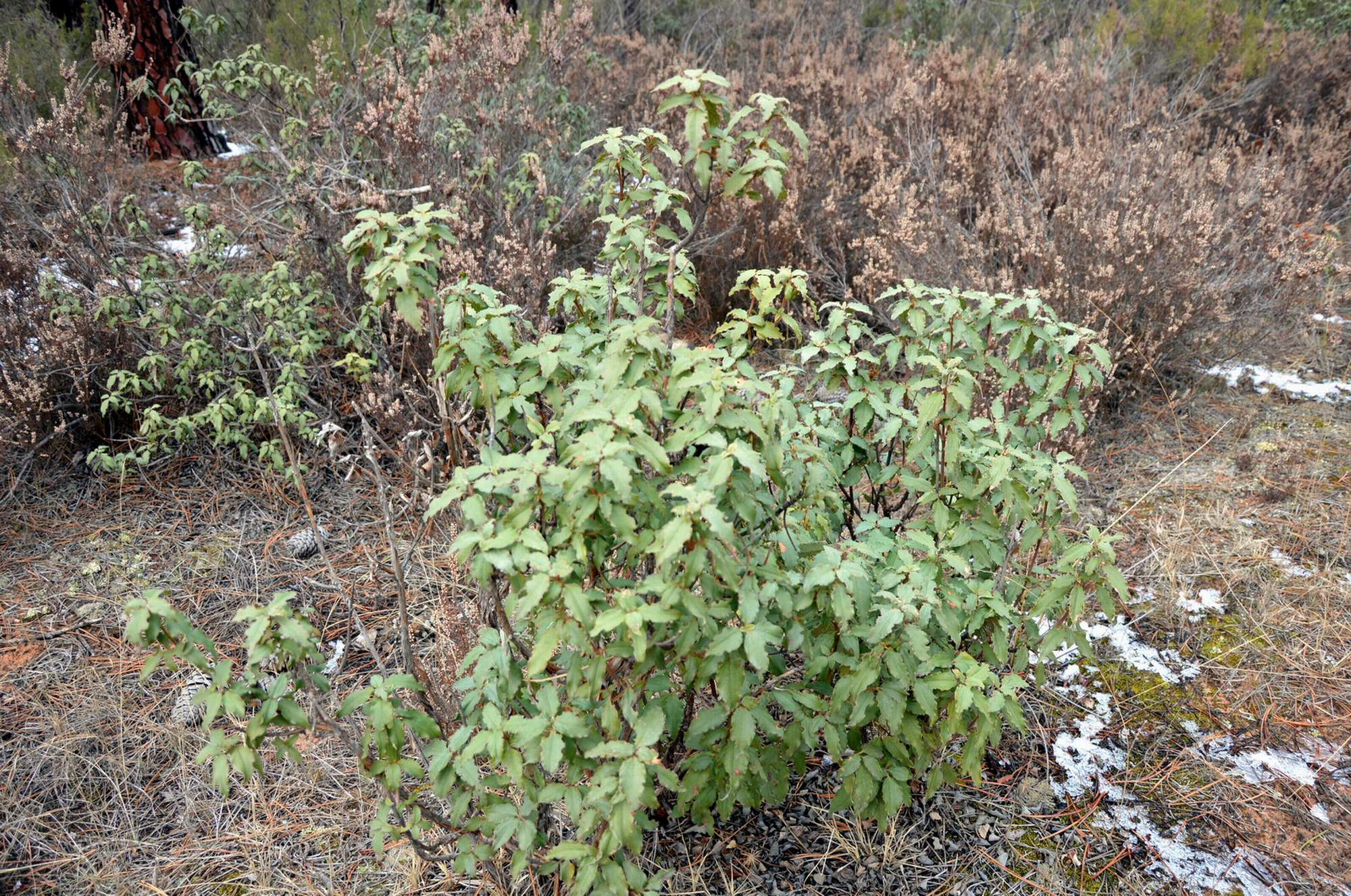 Detalle de estepa o jara en El Rodeno, Parque Cultural de Albarracín (2018).